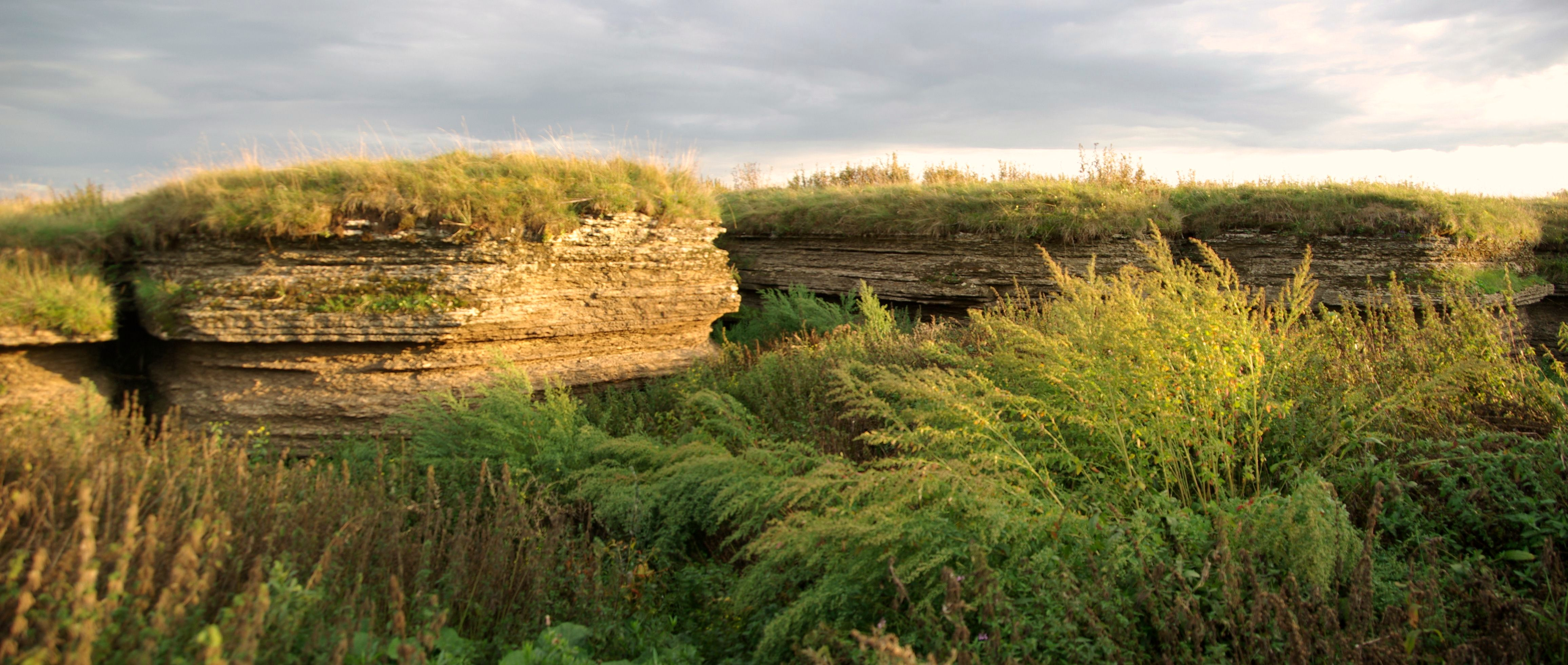 Kostivere karstiala on Kostivere alevikus Jõelähtme vallas asuv karstiala